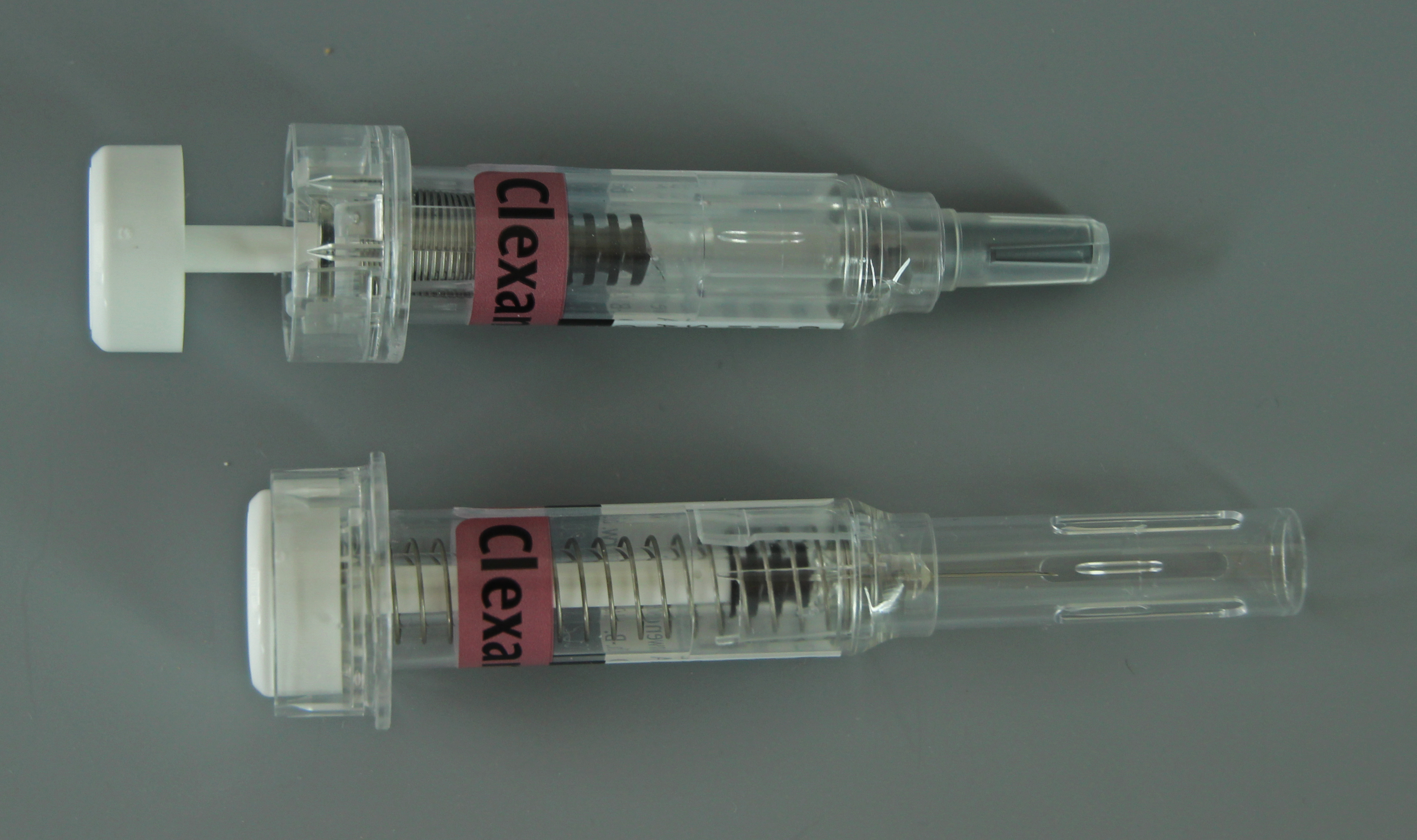 Bildinhalt: Thrombose-Fertigspritze mit 20 mg Clexane (Enoxaparin-Natrium) der Firma Sanofi-Aventis. Oben vor der Anwendung, unten danach. Aufnahmeort: Frankfurt am Main, Deutschland